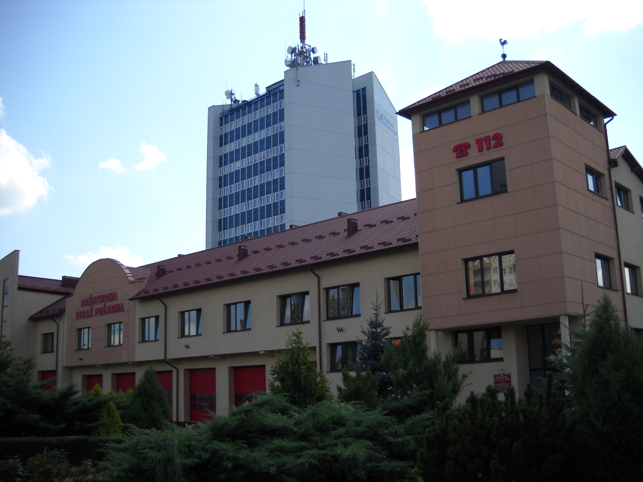 Budynek Straży pożarnej oraz Polimexu Mostostal